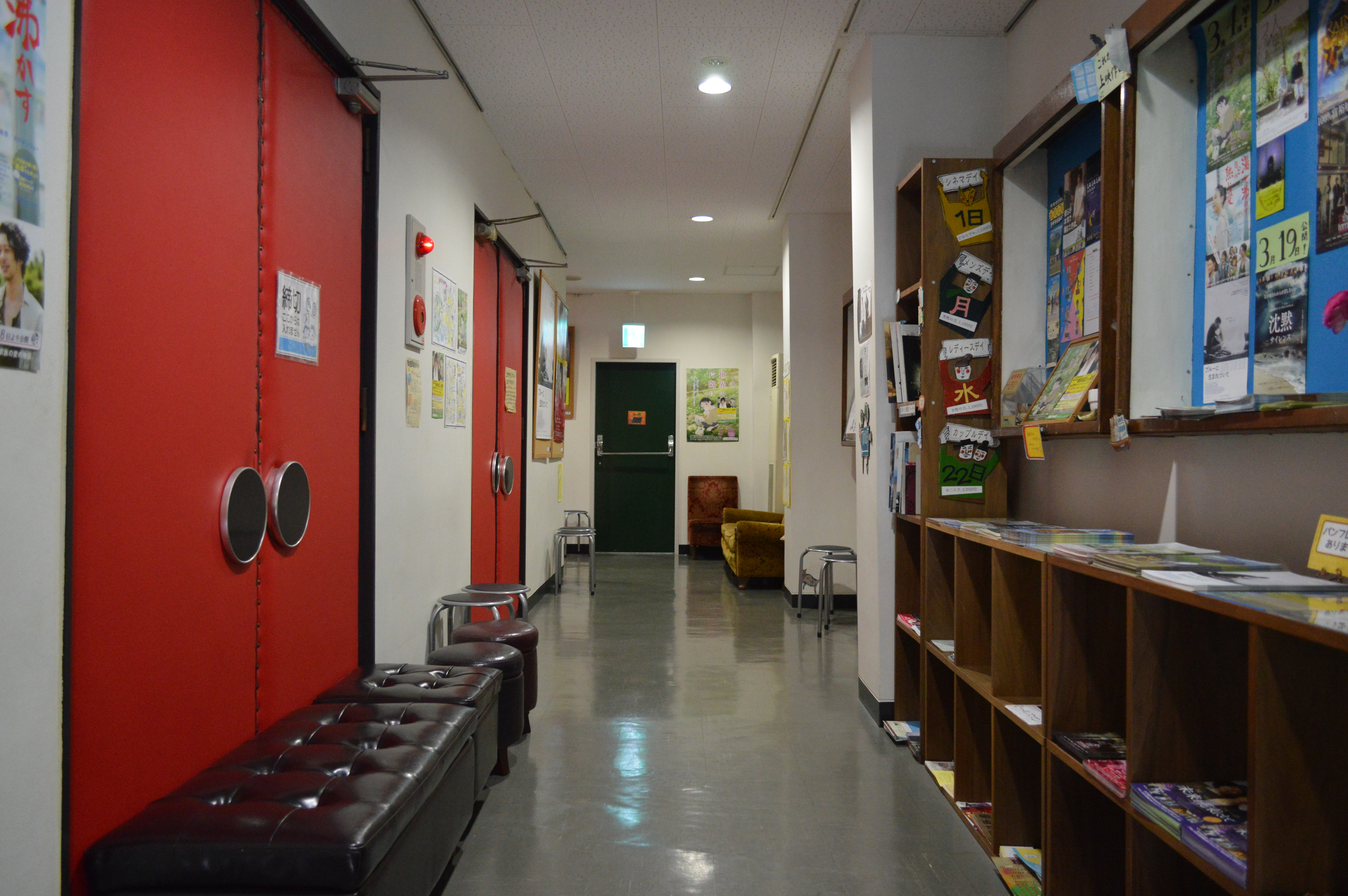 シネマ尾道。ロビー。